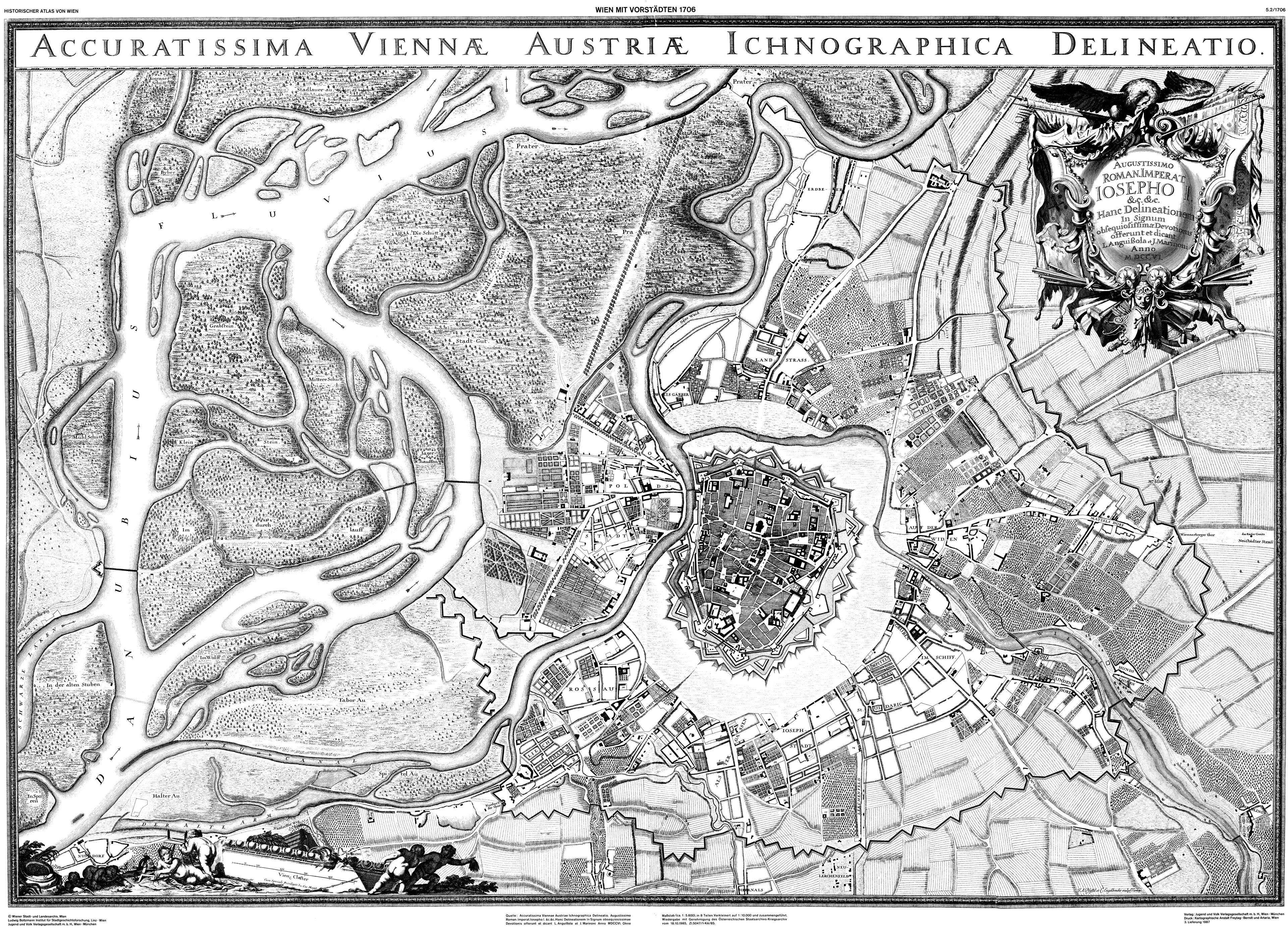 Grundrissplan von Wien mit seinen Vorstädten und dem Linienwall. 1704 (1706 gestochen und gedruckt) Kupferstich auf vier Blättern, Maßstab 1 : 5400, Ausrichtung nach Ostsüdost. Erster exakter Plan von Wien, der auch sämtliche Vorstädte umfasste.